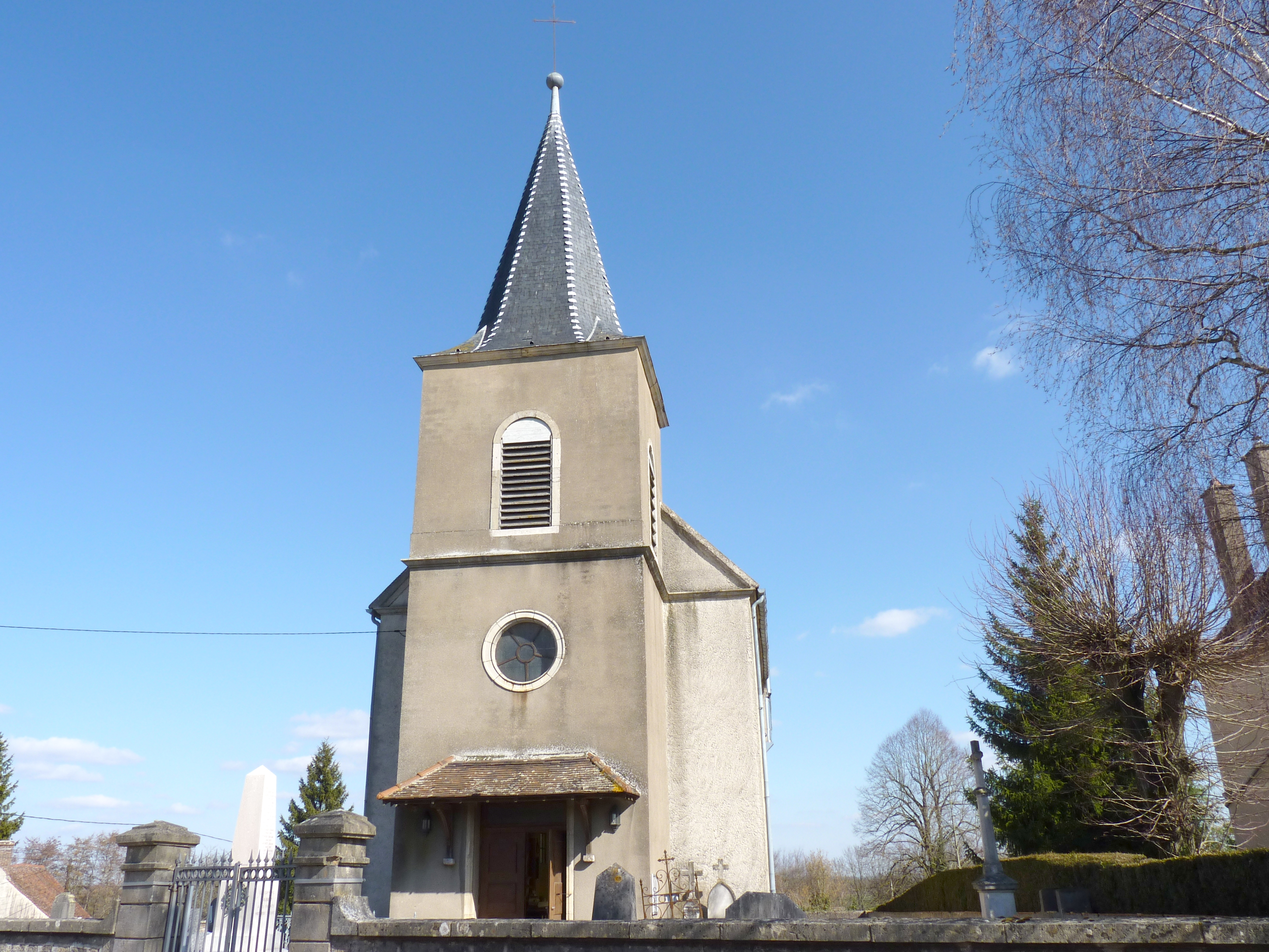 Église, Aubigny-en-Plaine (Côte d'Or, Bourgogne, France)